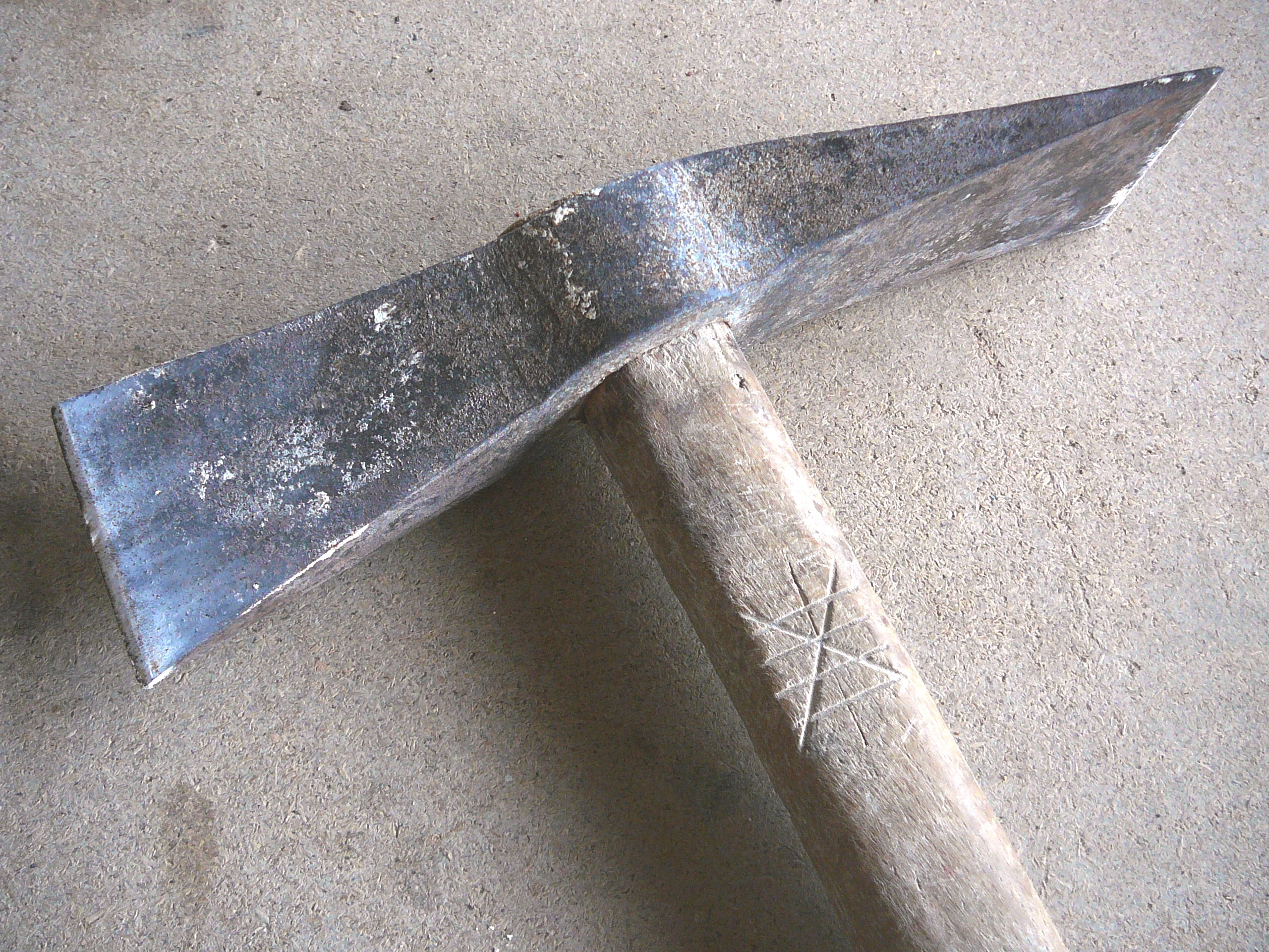 Une marque de taécheron sur un outils de tailleur de pierre appelé polka.